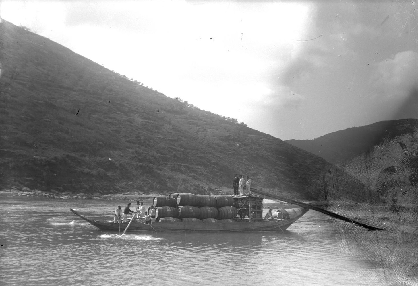 Aspecto de um barco rabelo com pipas de vinho a navegar no rio Douro.